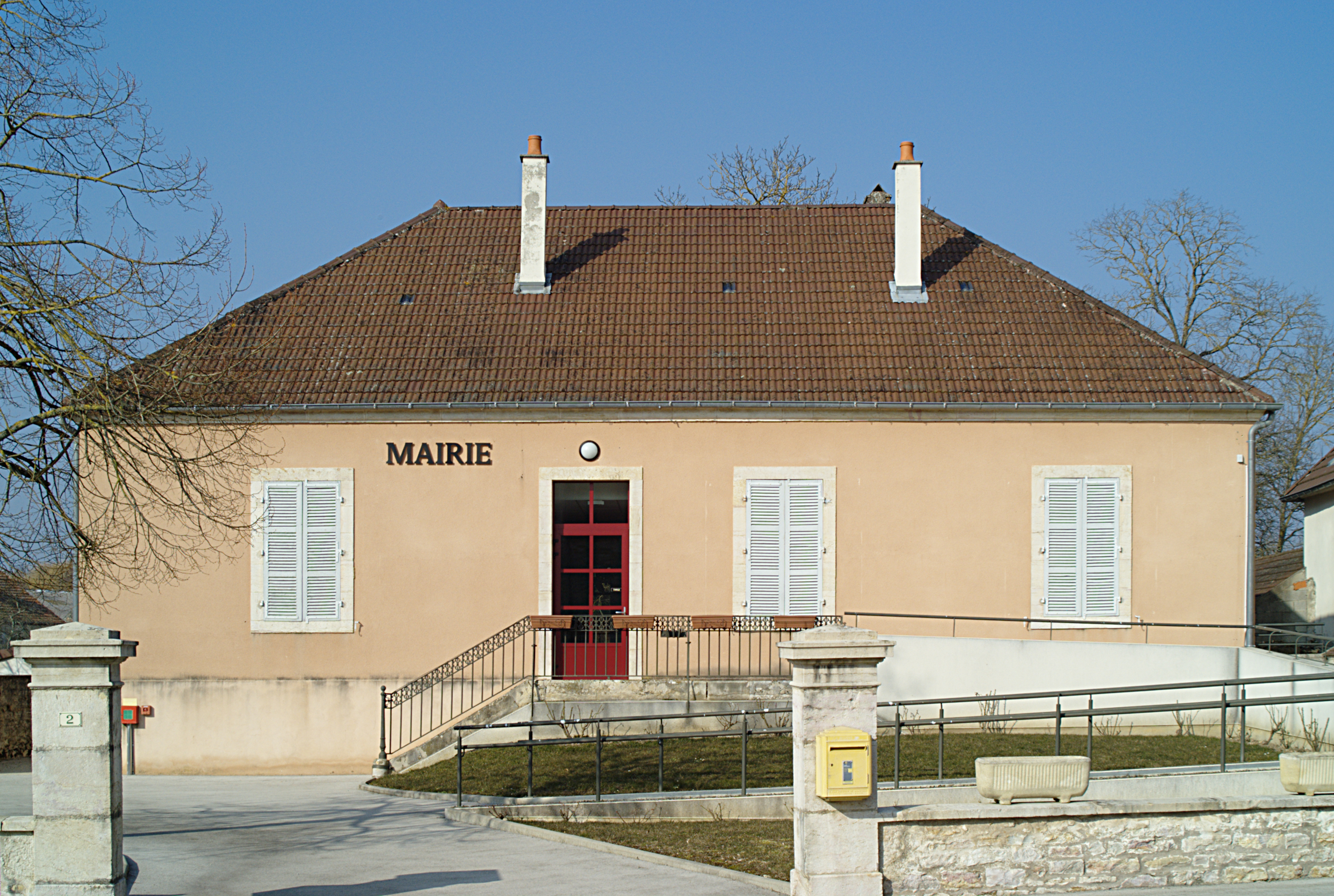 Mairie, Saint-Loup (Jura, Franche-Comté, France)